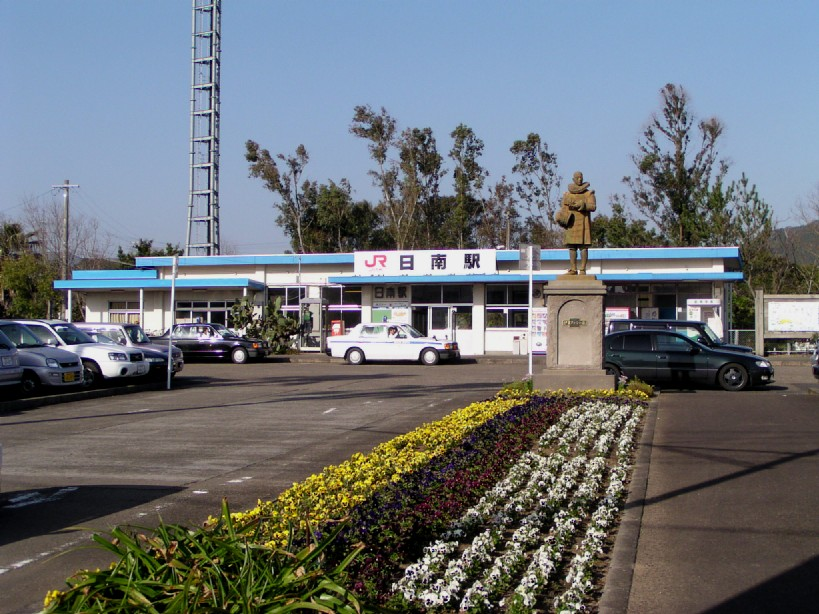 2005年3月30日に投稿者が日南駅にて撮影。